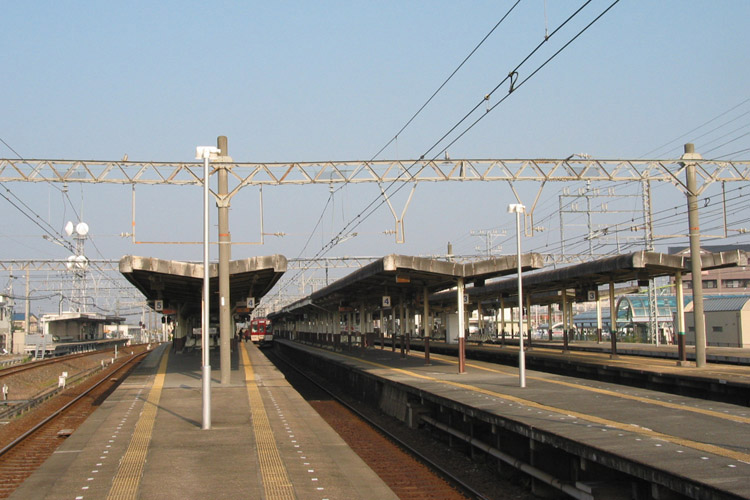 近鉄伊勢中川駅4・5番ホーム南端より撮影。2006/11/04 投稿者が撮影